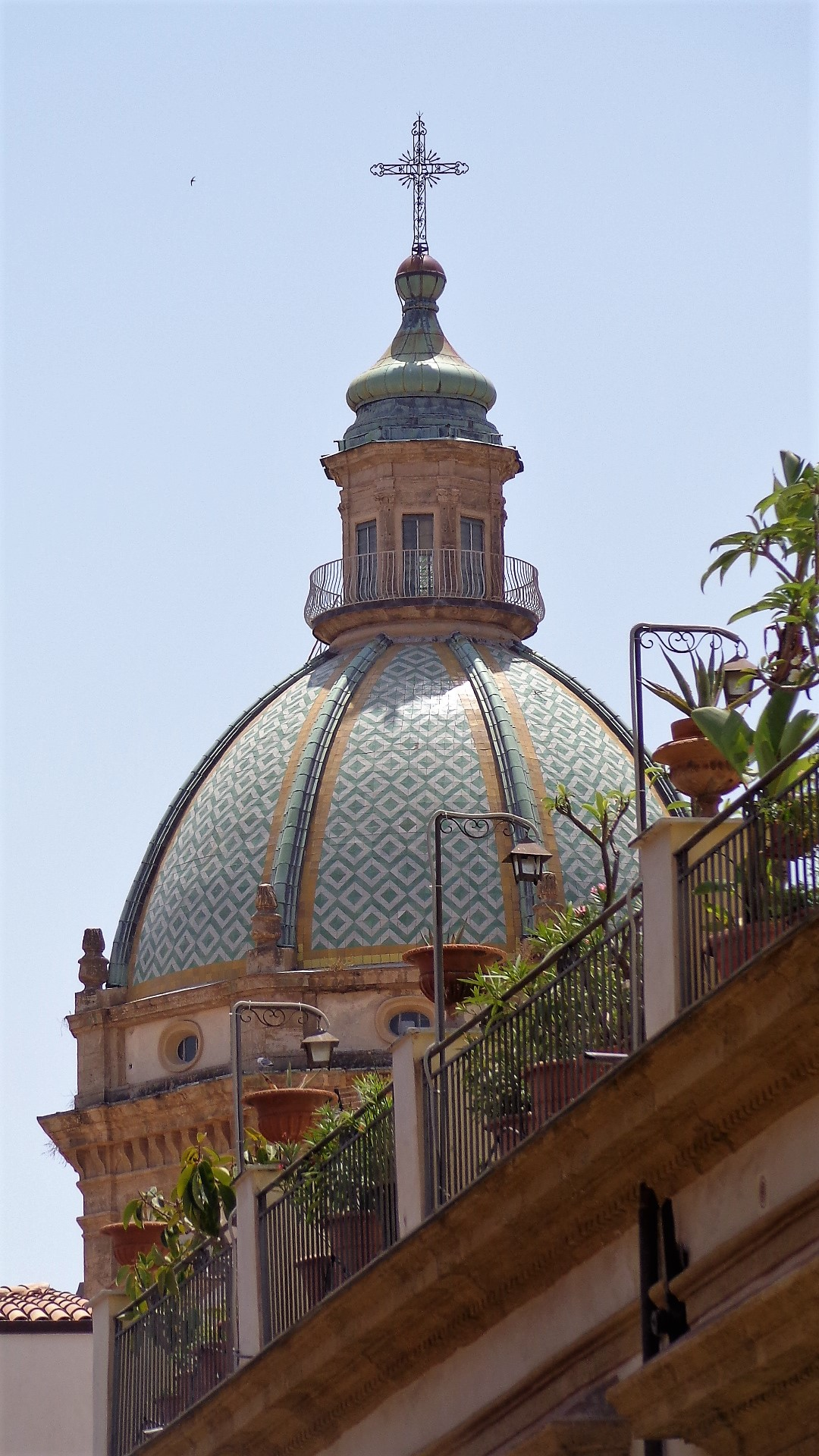 Cupola.